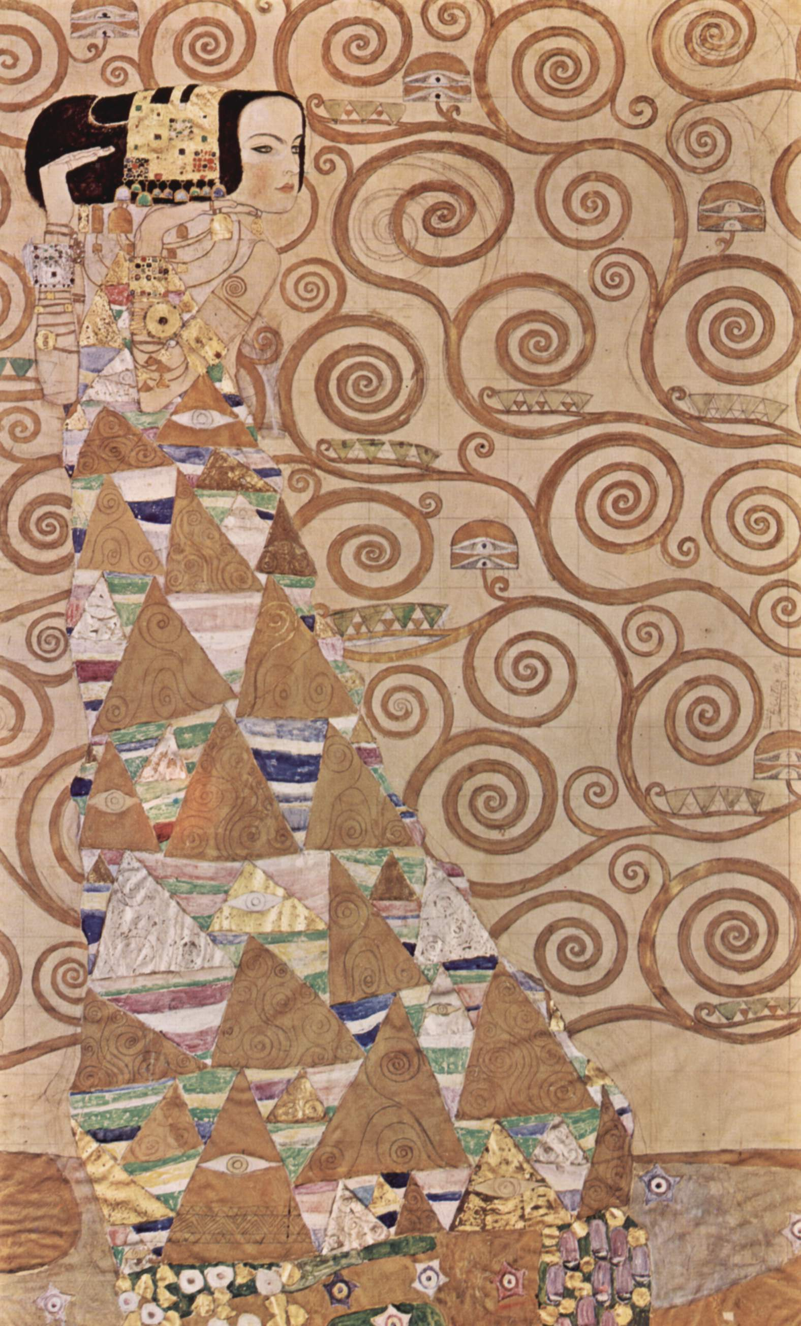 Entwurf für den Wandfries im Palais Stoclet in Brüssel, Detail: Die Erwartung